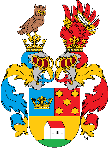 Wappen des österreichischen Historikers Franz Krones (1835–1902), verliehen anlässlich seiner Erhebung in den Ritterstand mit dem Prädikat "von Marchland" 1879. Zeichnung von Gerd Hruška ( Für weitere Informationen zu dieser Standeserhebung siehe (